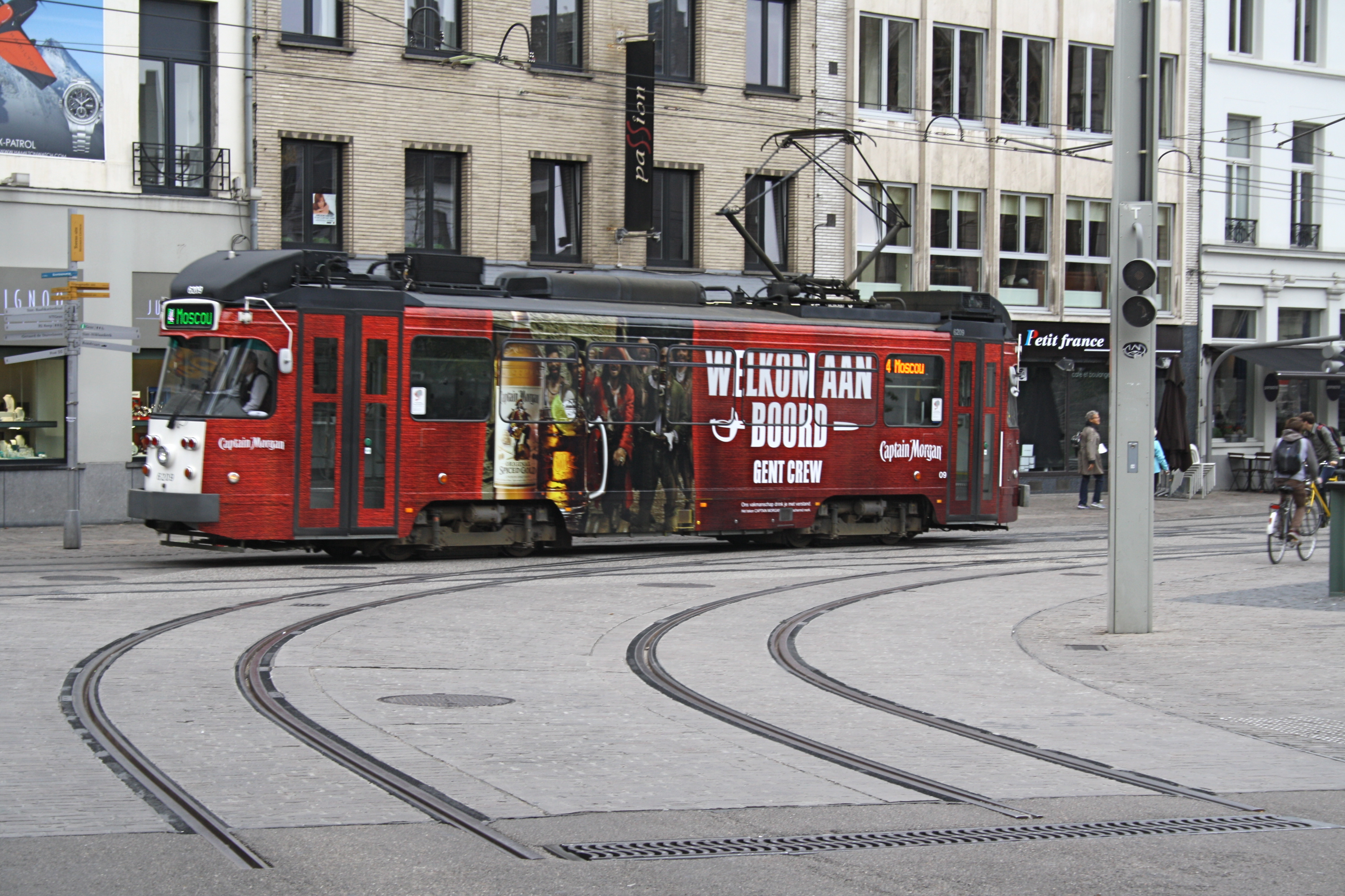 PCC Gent